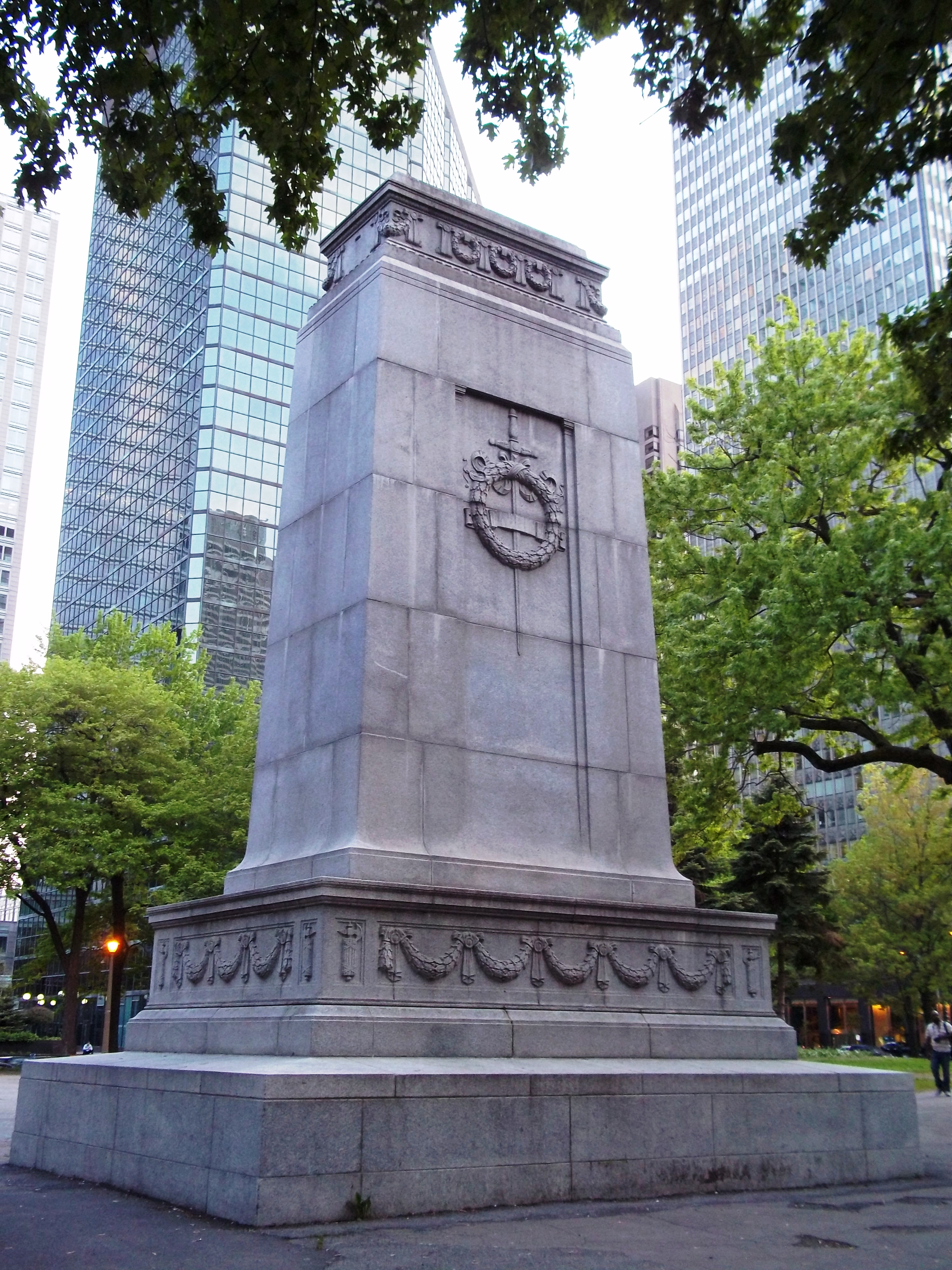 Monument aux morts, Place du Canada, Montréal. Y est inscrit : « À la gloire de Dieu, au souvenir des morts immortels à qui nous devons l'honneur et la paix ; 1914-1918, 1939-1945, 1950-1953 ».